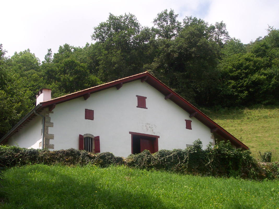 Casa natale di Michele garicoits, fondatore della Congregazione francese cattolica dei Preti del Sacro Cuore di Gesù di Bétharram. Foto personale.